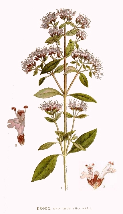 Original Description Konig, Origanum vulgare L.